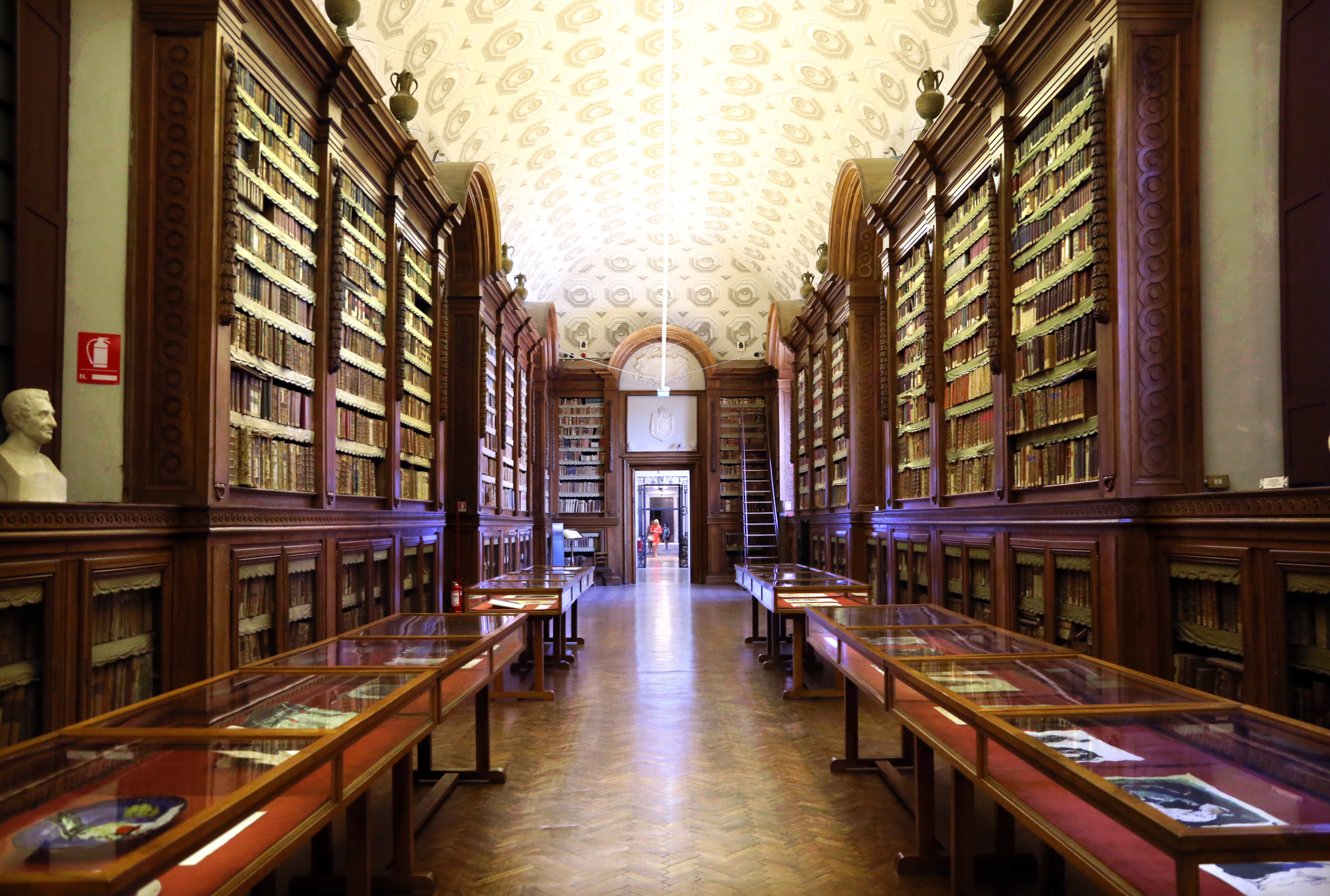 Biblioteca Palatina (Parma) This is a photo of a monument which is part of cultural heritage of Italy.